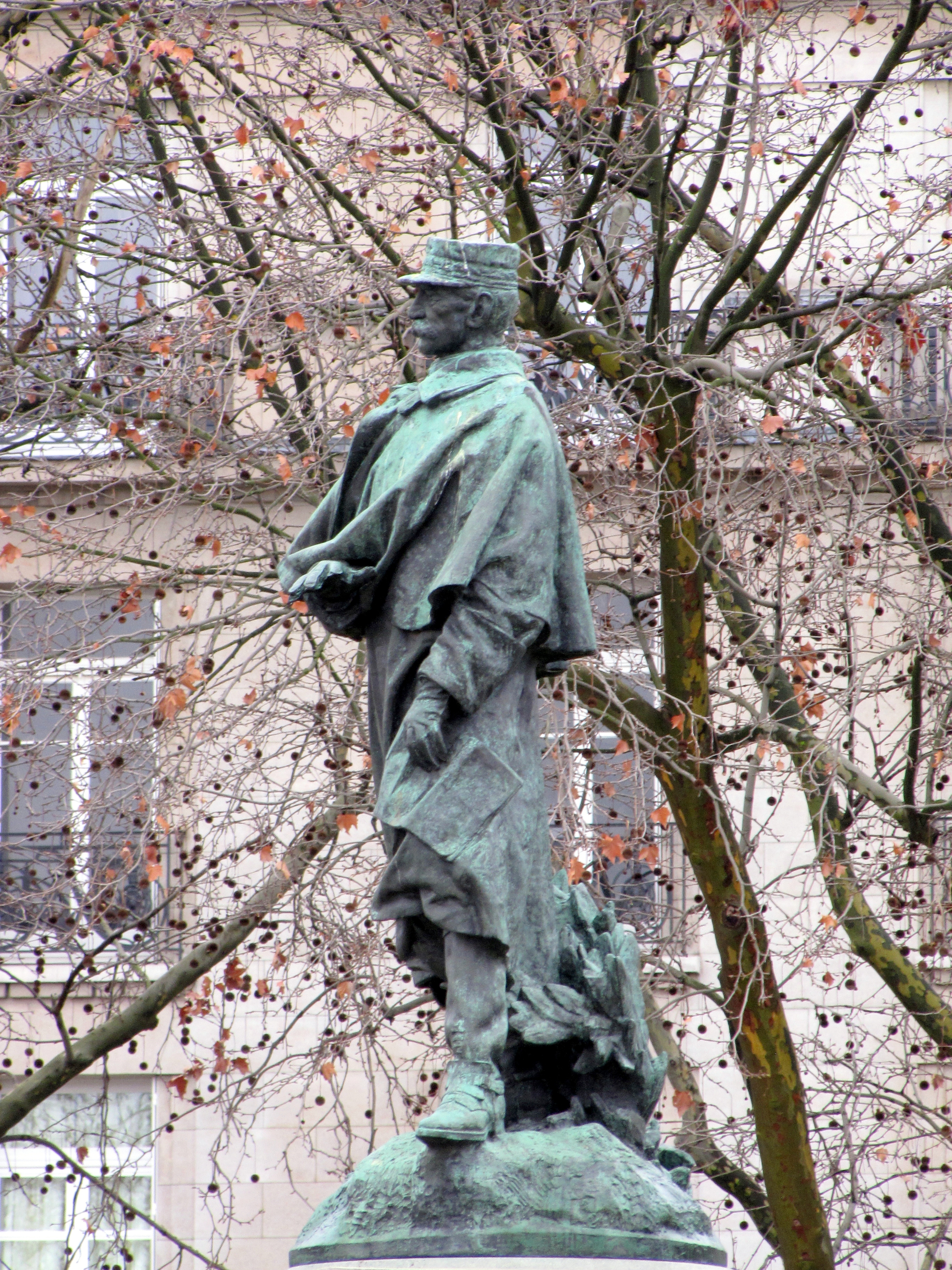 Париж